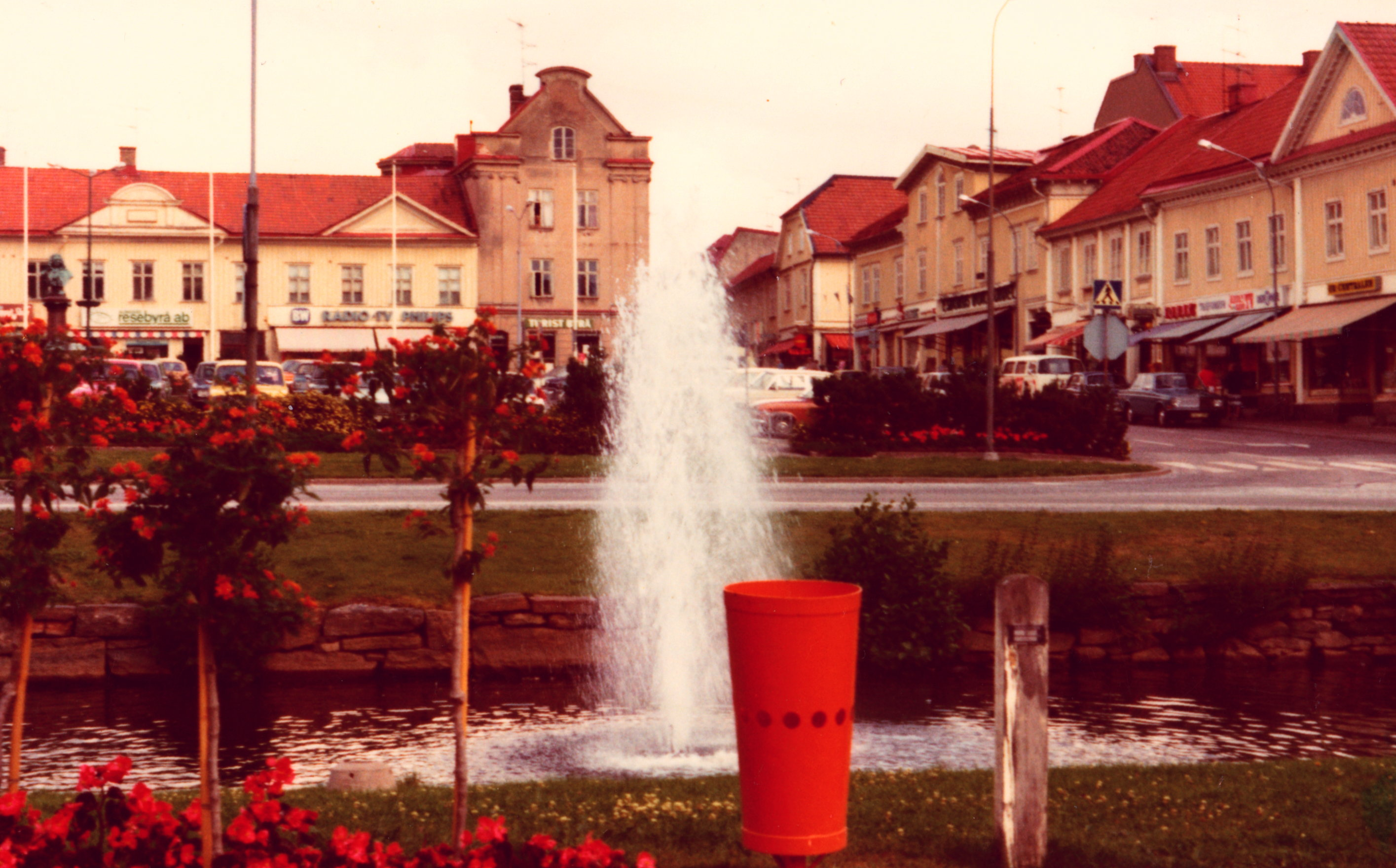 Gamla torget, Alingsås, ca 1974